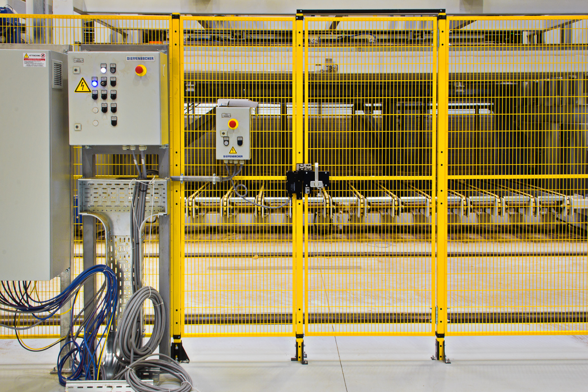 Protezine perimetrale macchine utensili